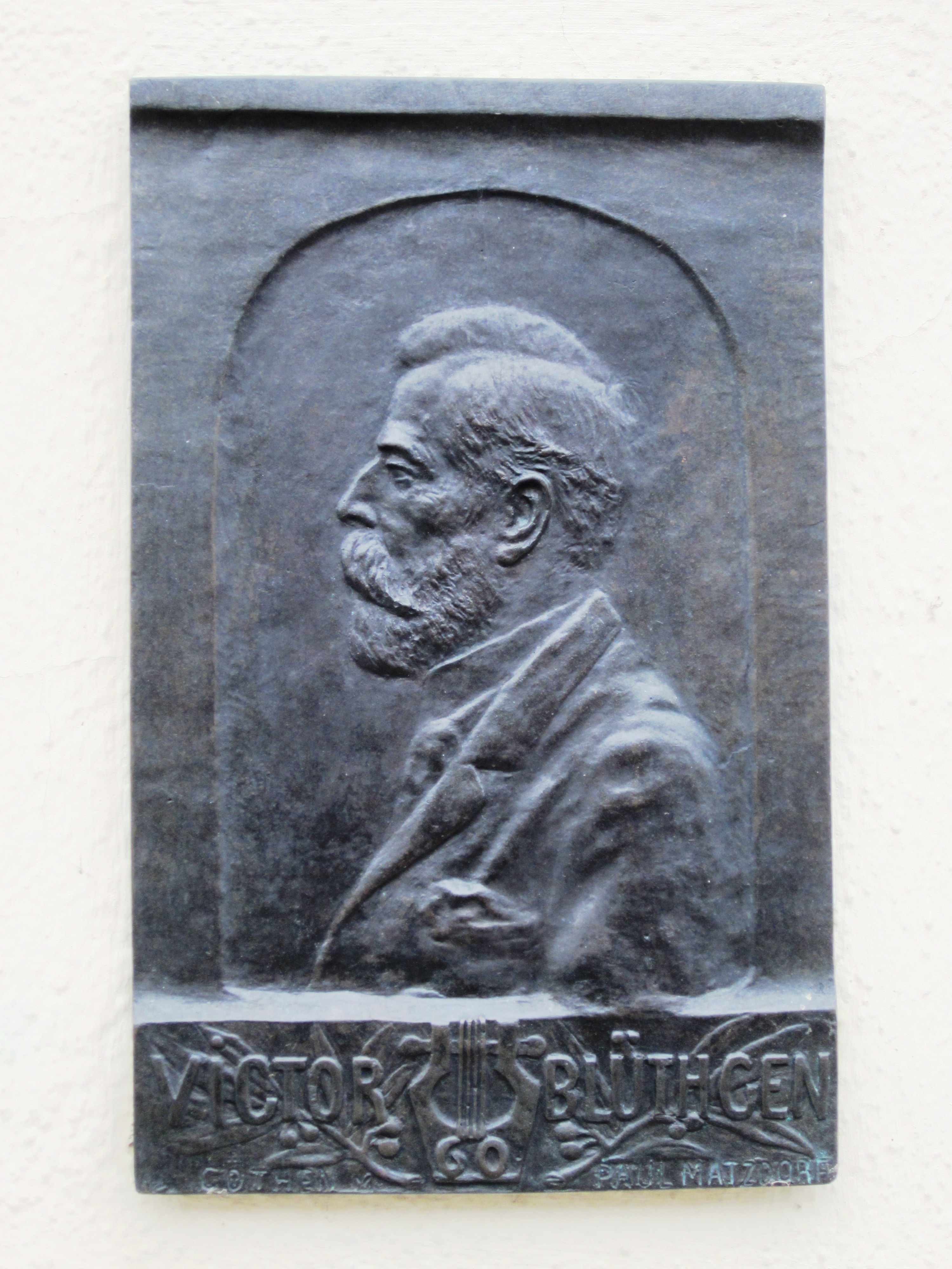 Plakette Victor Blüthgen in Bad Freienwalde von Paul Matzdorf (1864–1930)